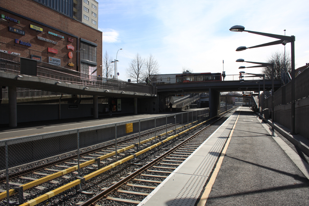 Lambertseter T-banestasjon fra Spor 1 mot Munkelia. Metrostandard og tett integrert med nybygde Lambertseter Senter.